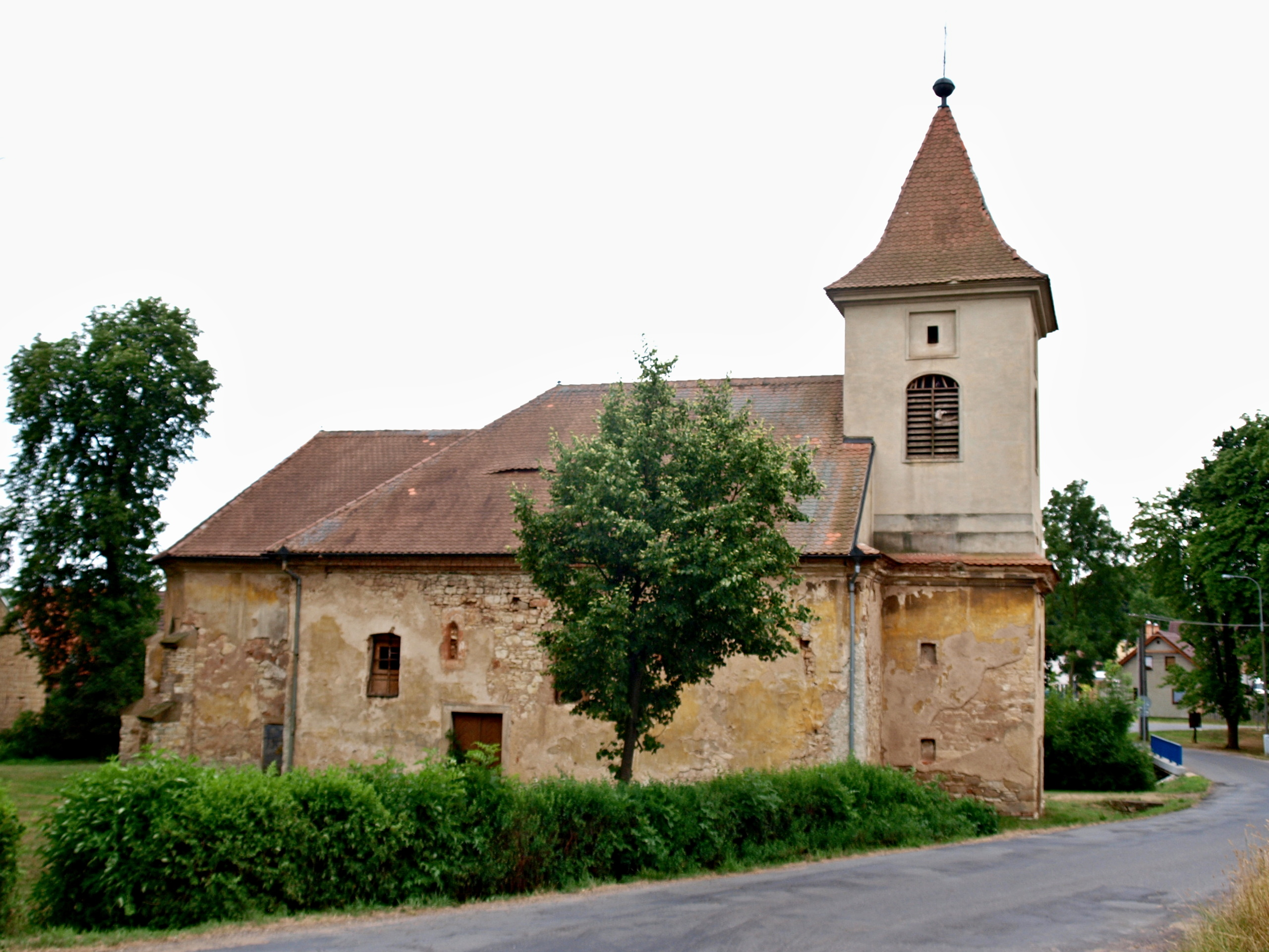 Nesuchyně, kostel sv. Markéty